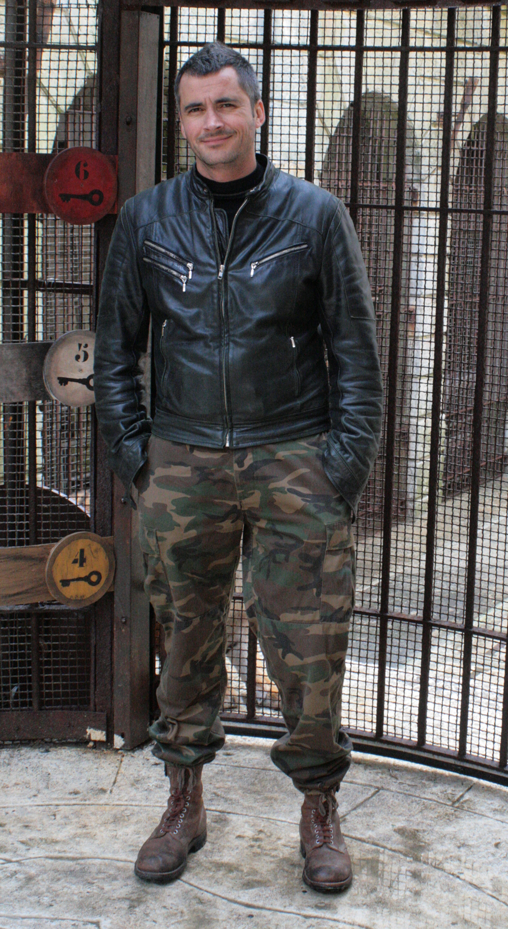 L'animateur Olivier Minne, près de la salle du trésor de l'émission Fort Boyard, en mai 2007.